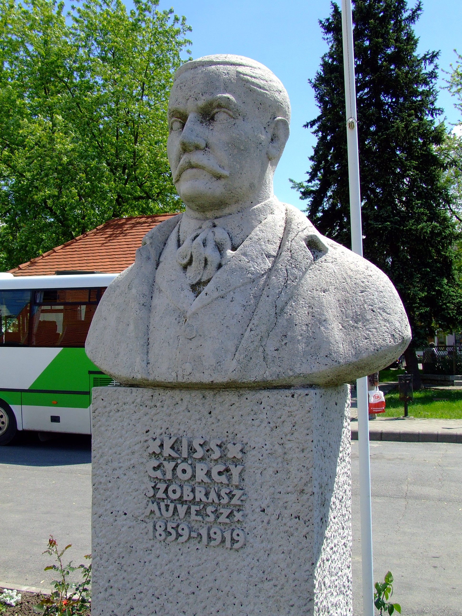 Kiss György szobrászművész szobra Szászváron